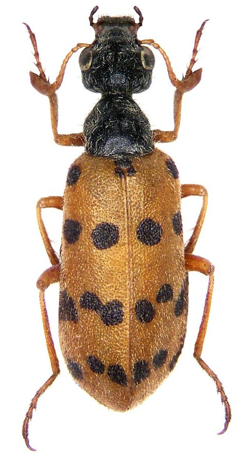 Familie: Meloidae Grösse: 12 mm Verbreitung: Marokko Fundort: Marokko, Kenitra, 1970 Foto: U.Schmidt, 2006